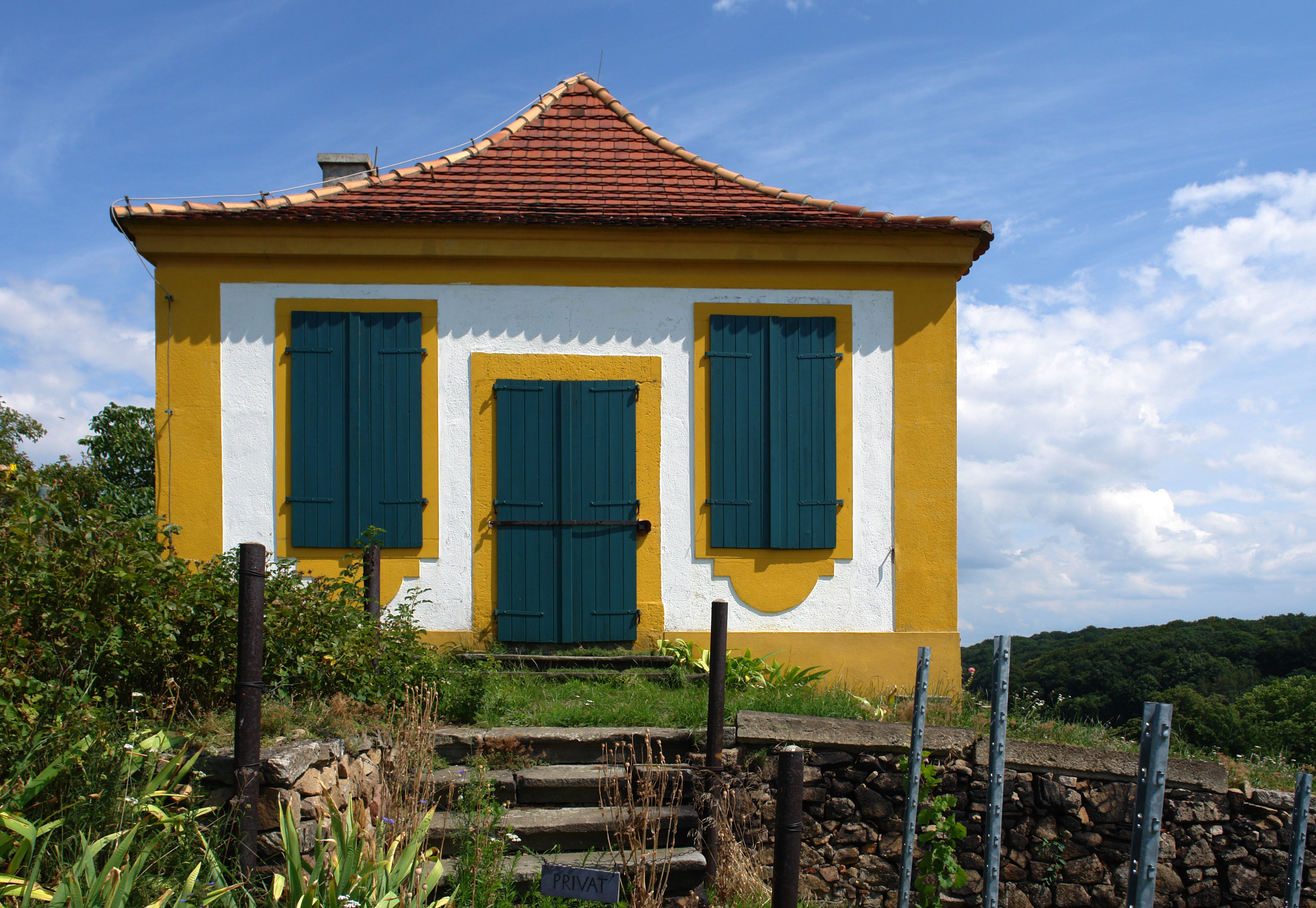 Seusslitz-Luisenburg Haus im Weinberg